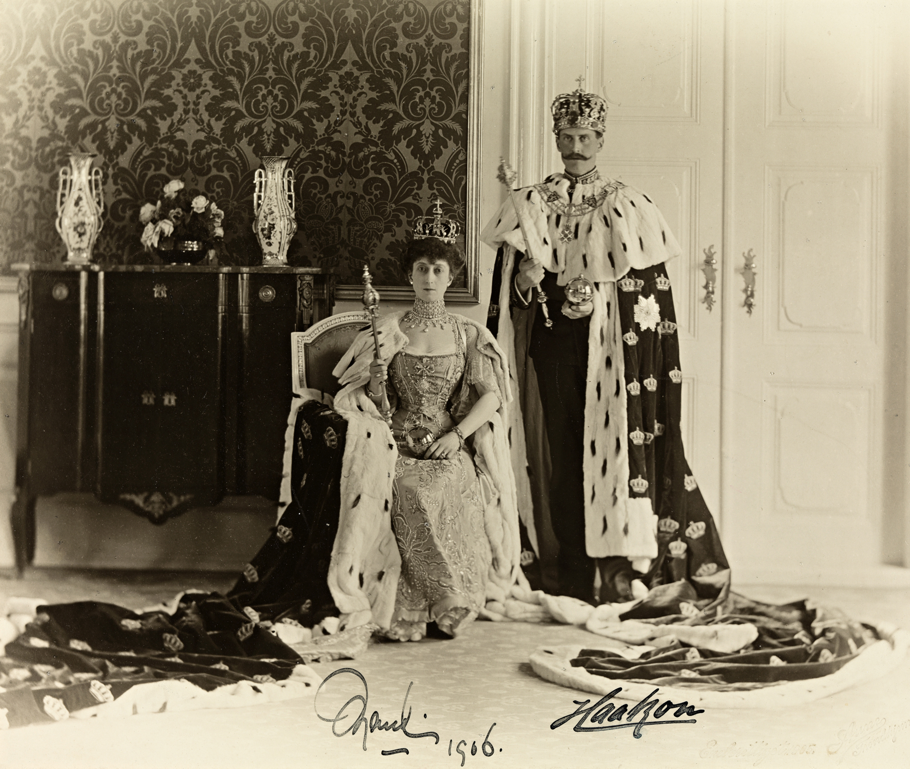 Tittel / Title: Dronning Maud (1869-1938) og Kong Haakon VII (1872-1957) / Queen Maud and King Haakon VII Motiv / Motif: Dette eksemplaret har tilhørt Fridtjof Nansen (1861-1930) Dato / Date: 1906 Fotograf / Photographer: Peder O. Aune (Trondhjem) Sted / Place: Sør-Trøndelag, Trondheim Eier / Owner Institution: Nasjonalbiblioteket / National Library of Norway Lenke / Link: Bildesignatur / Image Number: blds_04776